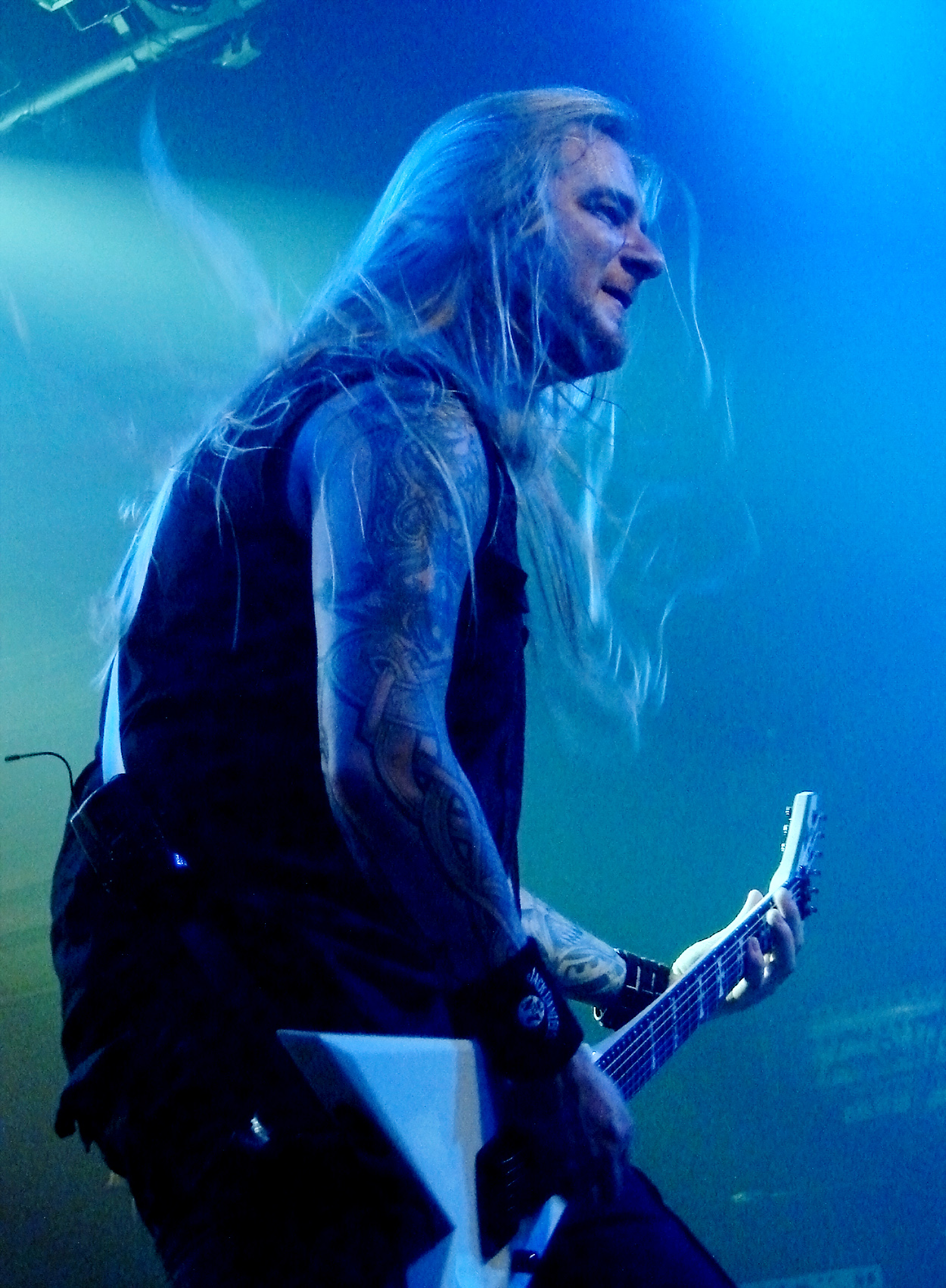 Soilwork en concert à Paris, à la Locomotive, le 12/10/07.